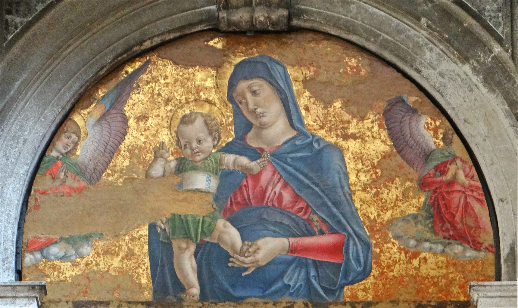 Vierge à l'Enfant 1480 Oeuvre de Bartolomeo Vivarini (1432-1499) dans la lunette au-dessus de l'autel de la nef de droite Eglise Sant'Eufemia (Sainte Euphémie) Giudecca / Venise L'église Sant'Eufemia a été fondée au IXè siècle sur l'île de la Giudecca à Venise Elle a été restaurée à plusieurs reprises, les travaux de décoration (stucs, peintures,..) réalisés au XVIIIè siècle y sont encore très visibles. L'église d'origine avait la forme traditionnelle d'une basiliques vénéto-byzantine, plusieurs colonnes et des chapiteaux datent de sa fondation. Elle comporte trois nefs qui sont orientées parallèlement au canal de la Giudecca. La façade possède un intéressant portique. article Wikimedia sur l'artiste Bartolomeo Vivarini